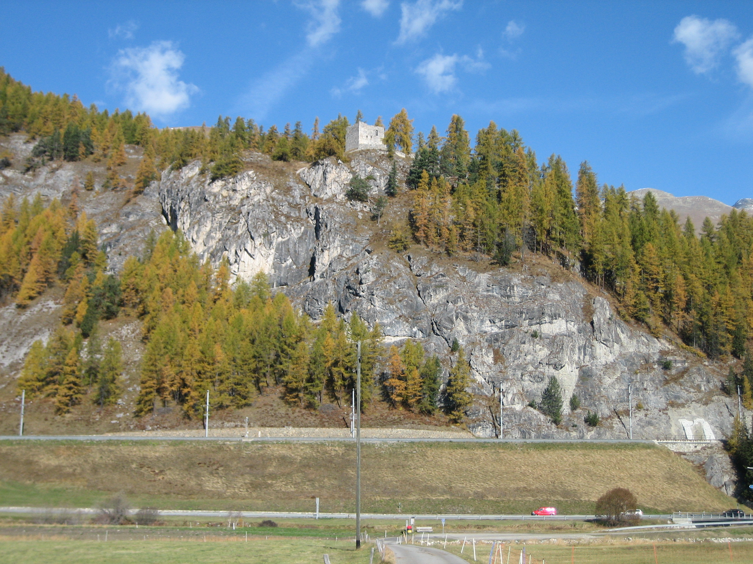 Burg Guardaval, Madulain GR